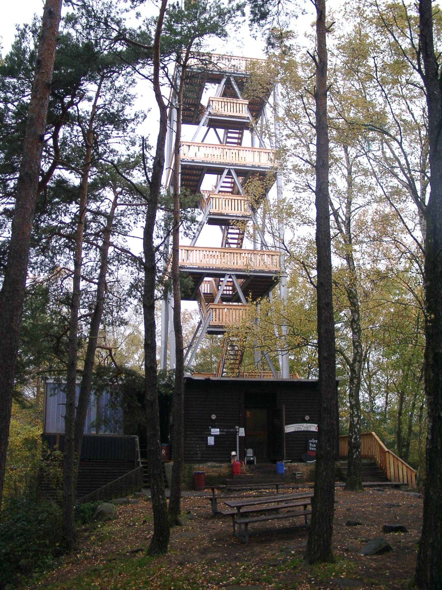 Der Eckkopfturm bei Deidesheim, errichtet 1975